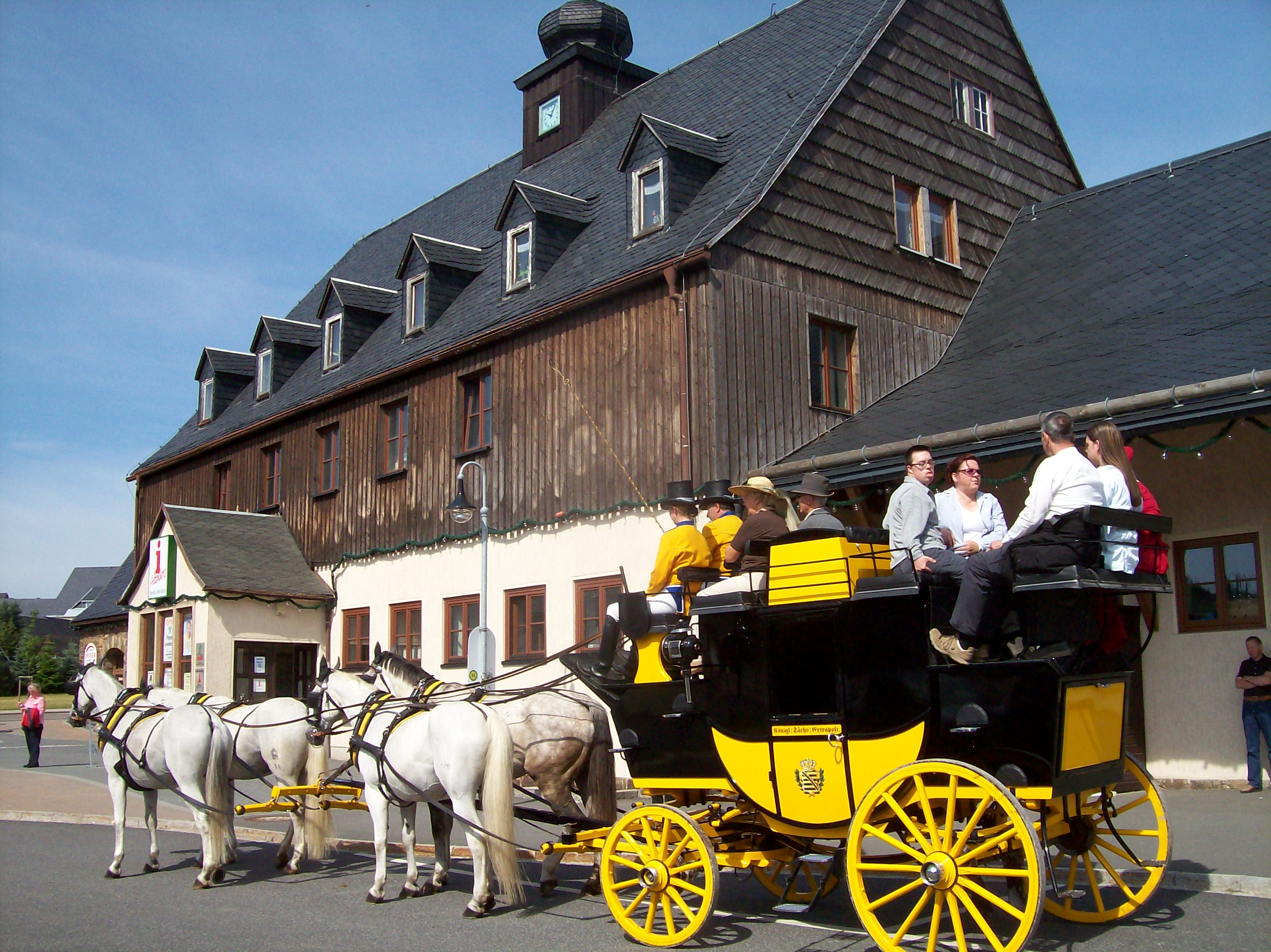 Postkutschenhalt am Bahnhof Altenberg